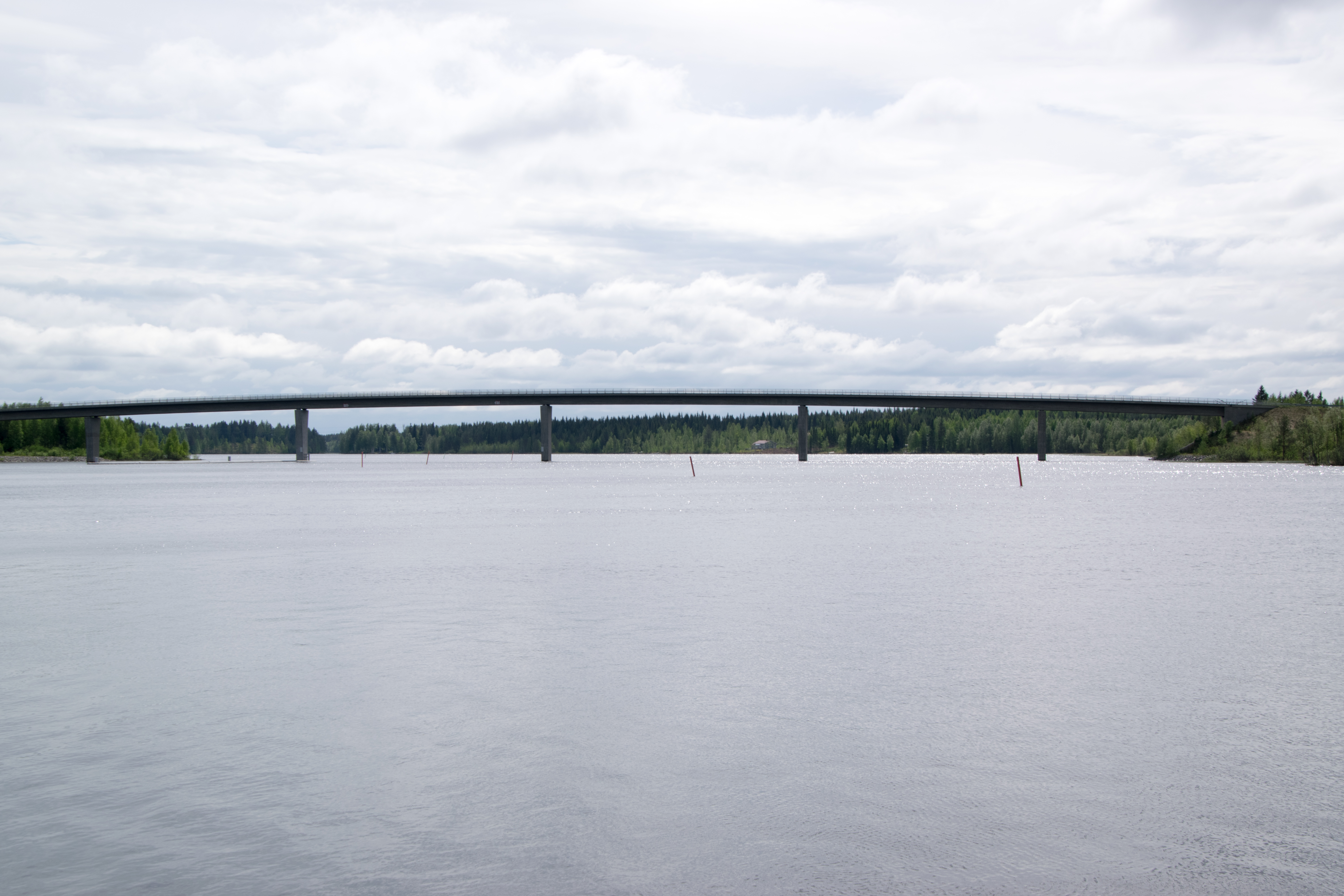 Mönnin silta Kontiolahdella